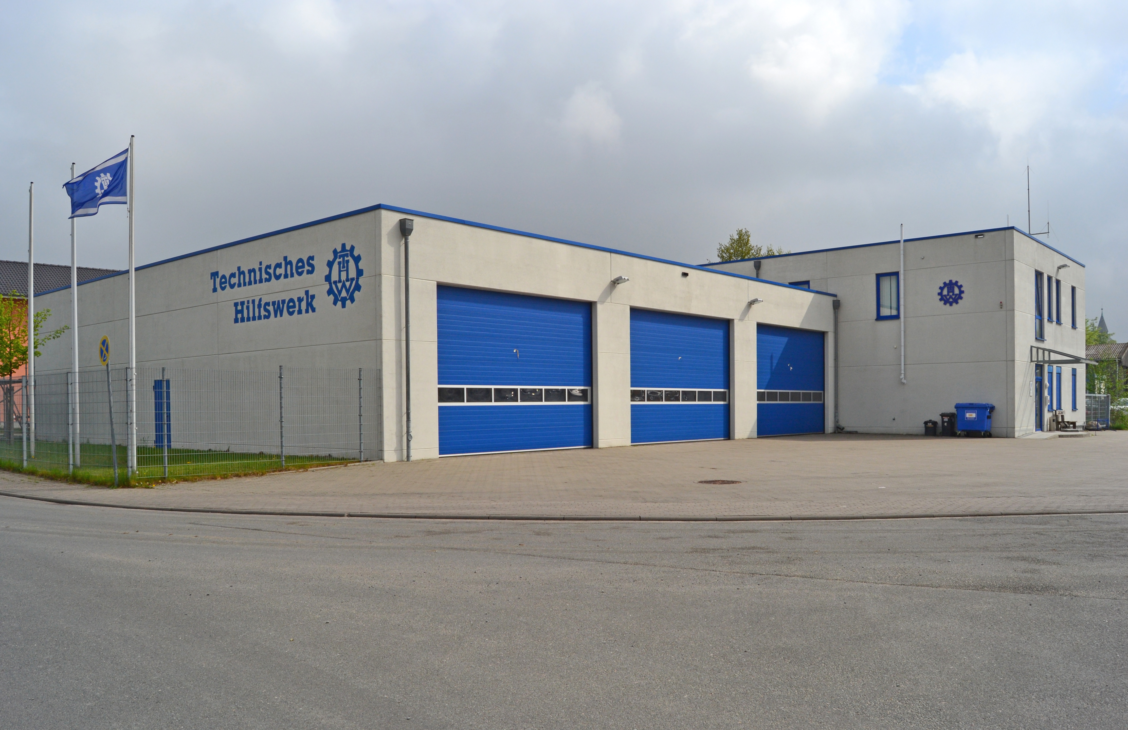 Das Gebäude des THW Ortsverbandes Pinneberg